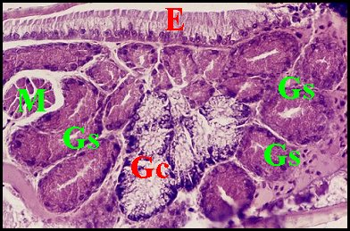 Glandes de deux types dans la gnathocoxa mâle d' Araniella cucurbitina